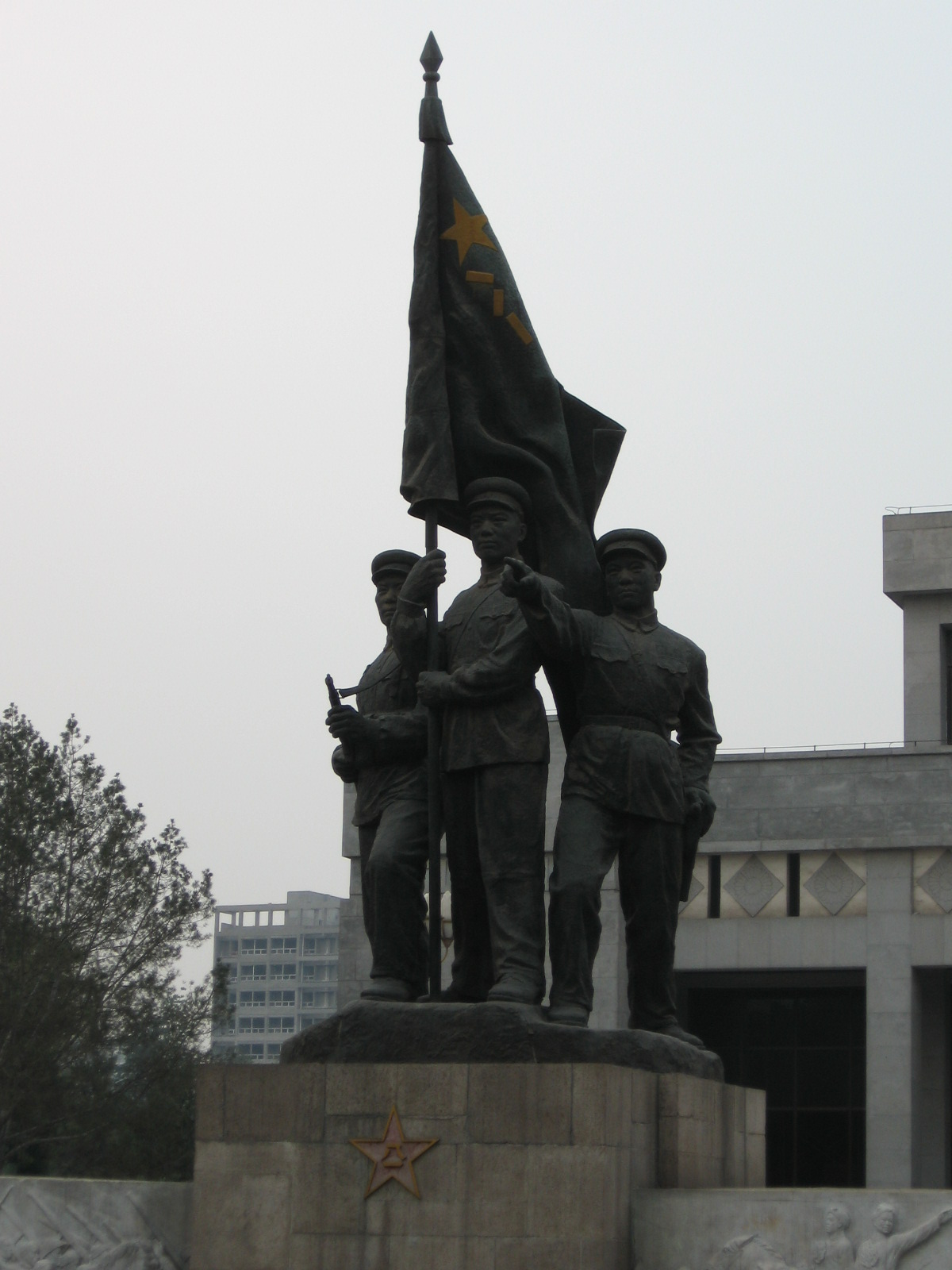 中国河北石家庄华北军区烈士陵园内铜像。